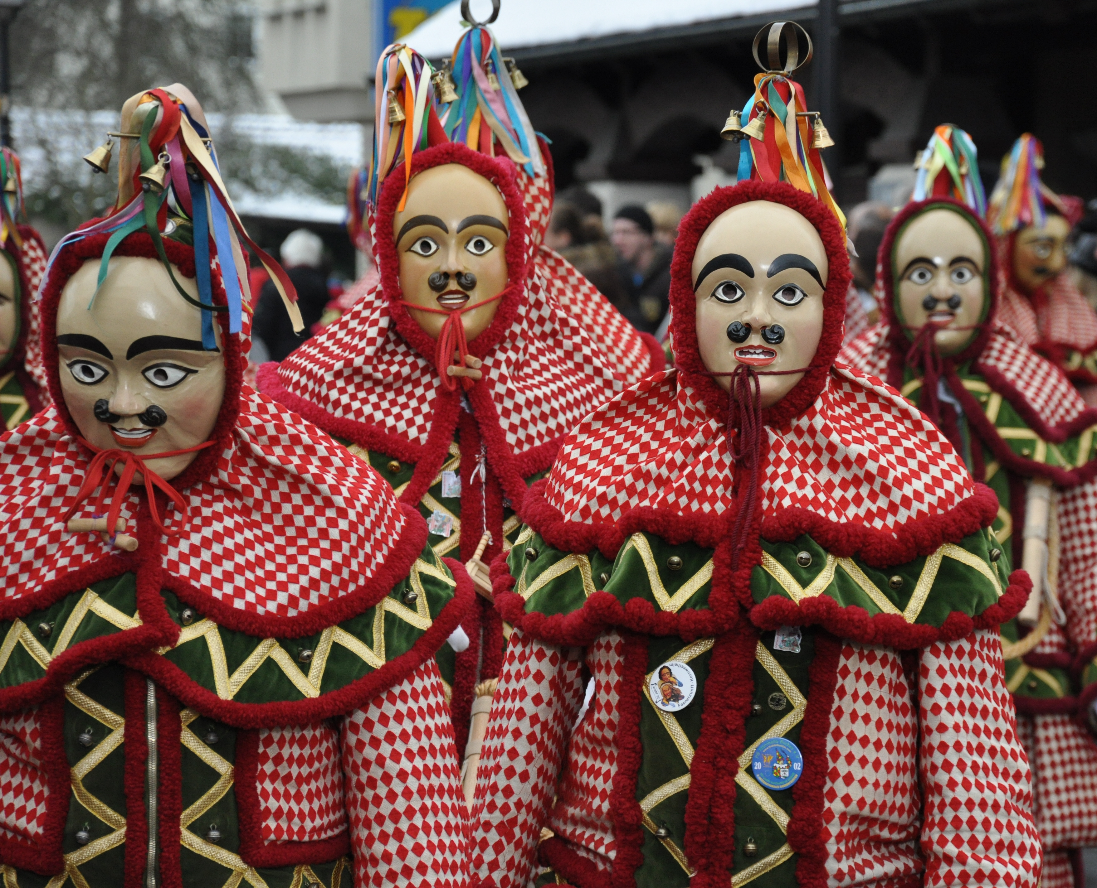 Teilnehmer der Schneller-WM: Kindinger Fosanegl, Kinding (Altmühltal, Oberayern) Fotografiert beim Landschaftstreffen der Vereinigung Schwäbisch-Alemannischer Narrenzünfte (VSAN) 2015 in Weingarten; Narrensprung am Sonntag, 25. Januar 2015